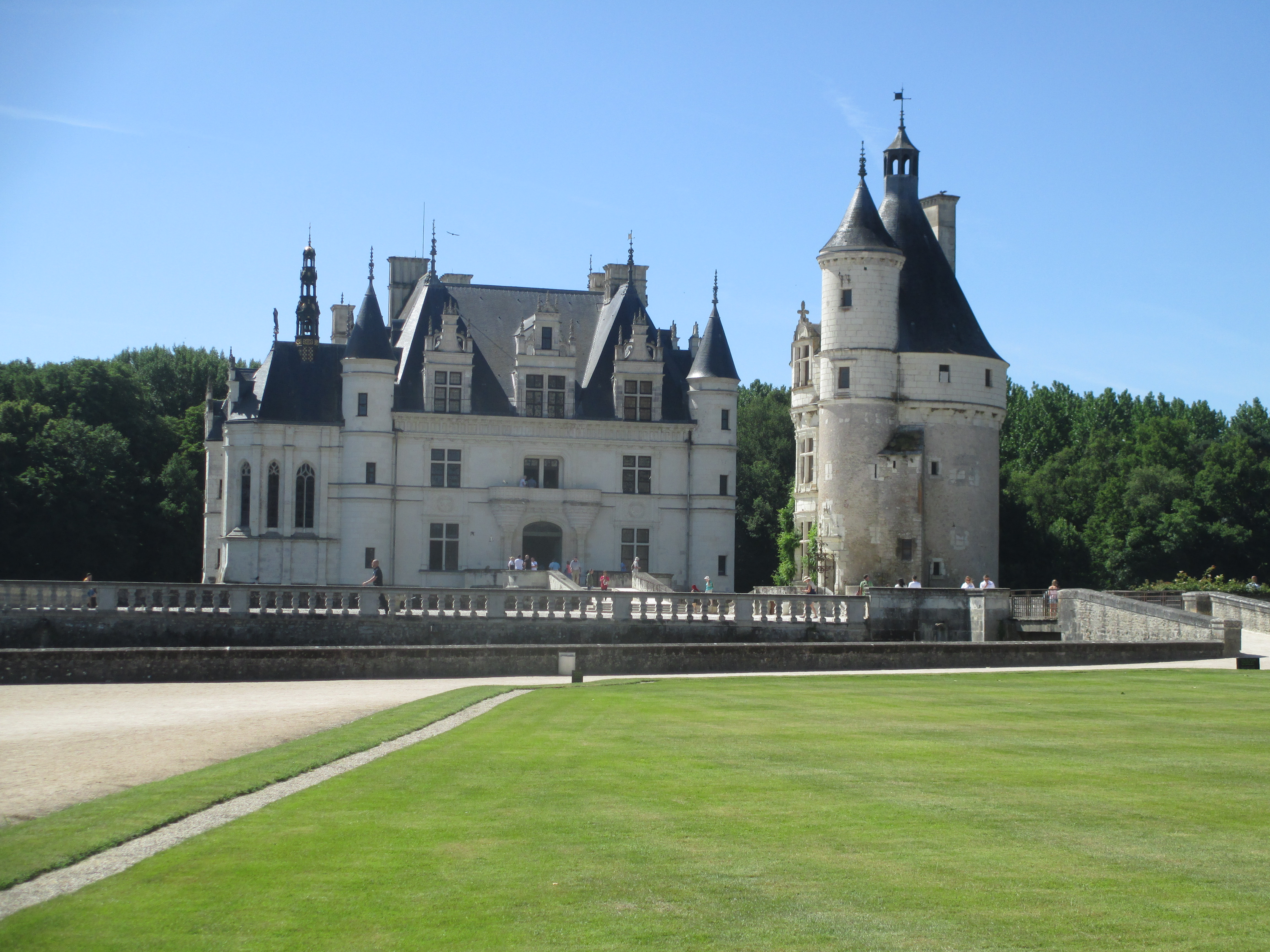 טירת שנונסו